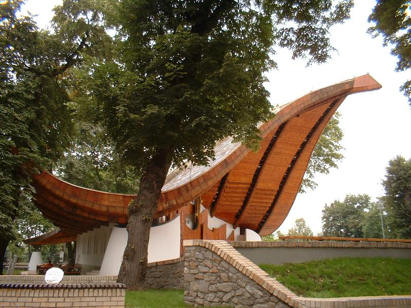 Restoran u Parku Taras Ševčenko Ukrajina